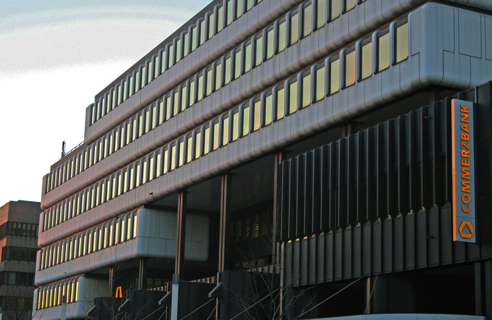 Denkmalschützes Gebäude der Spätmoderne an der Kampstraße 45, Dortmund